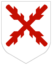 Représentation approximative artistique d'un écu burgonde.